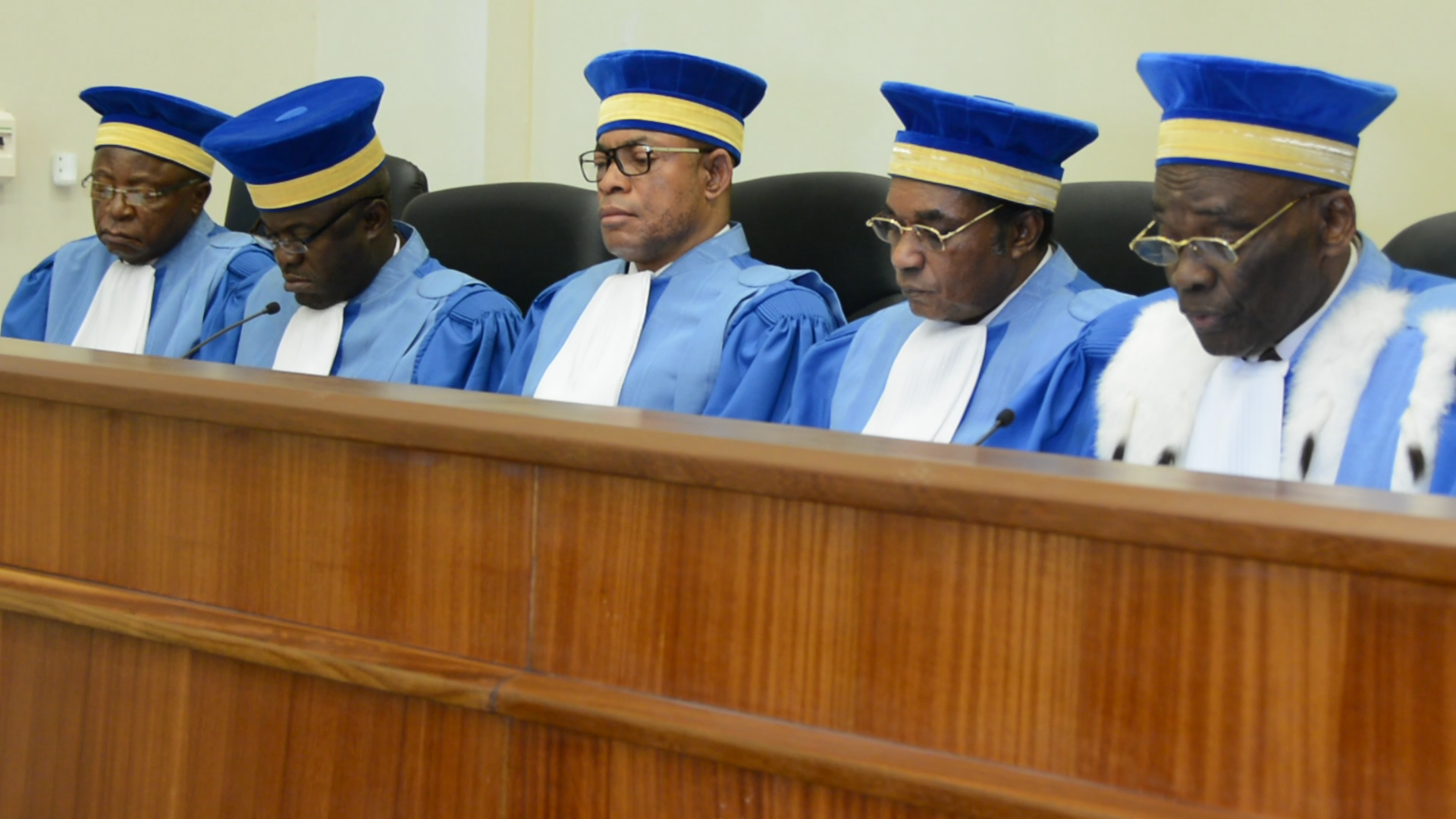 Audience à la Cour Constitutionnelle de la RDC